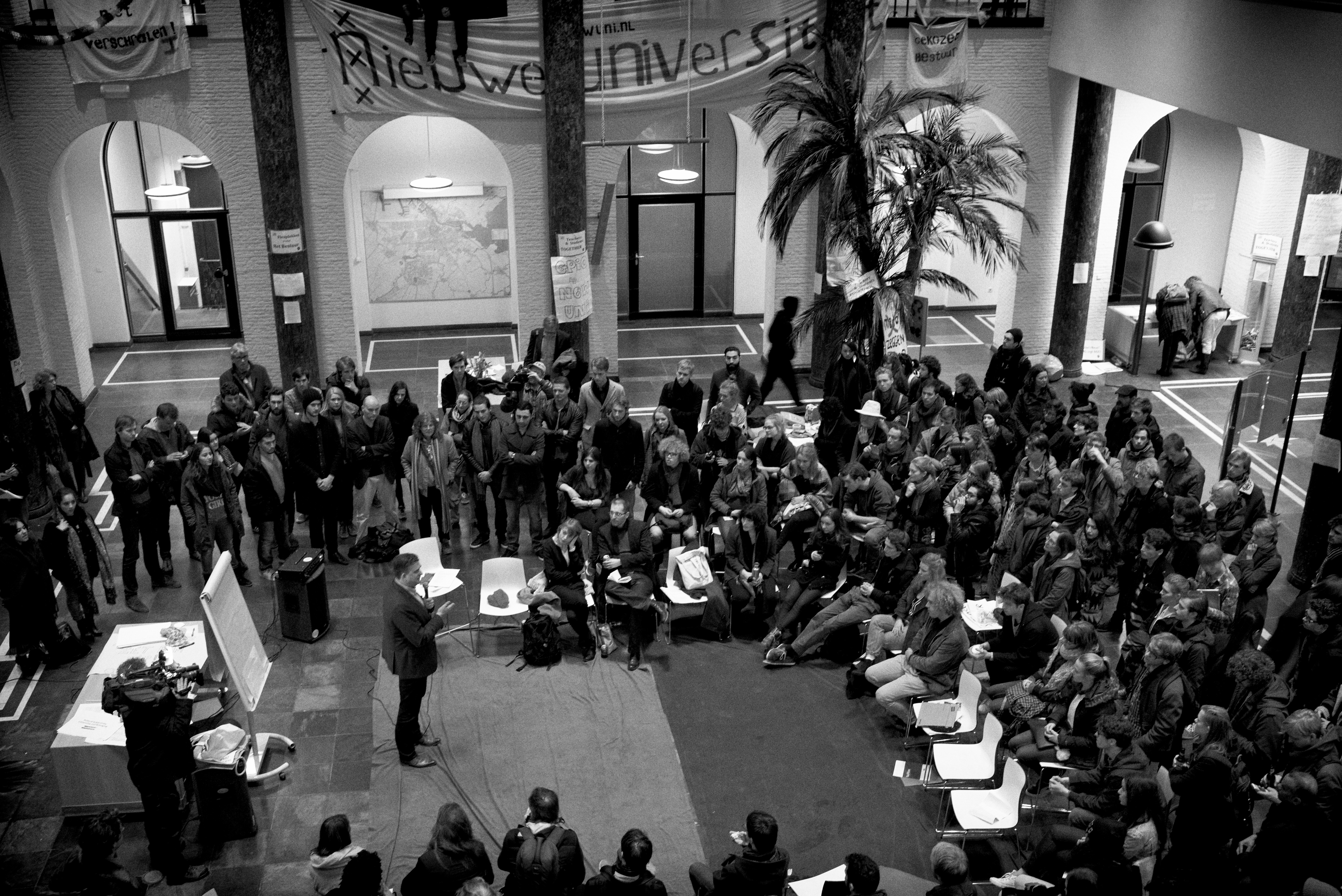 L1002114